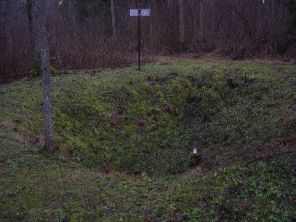 Simuna meteorite crater